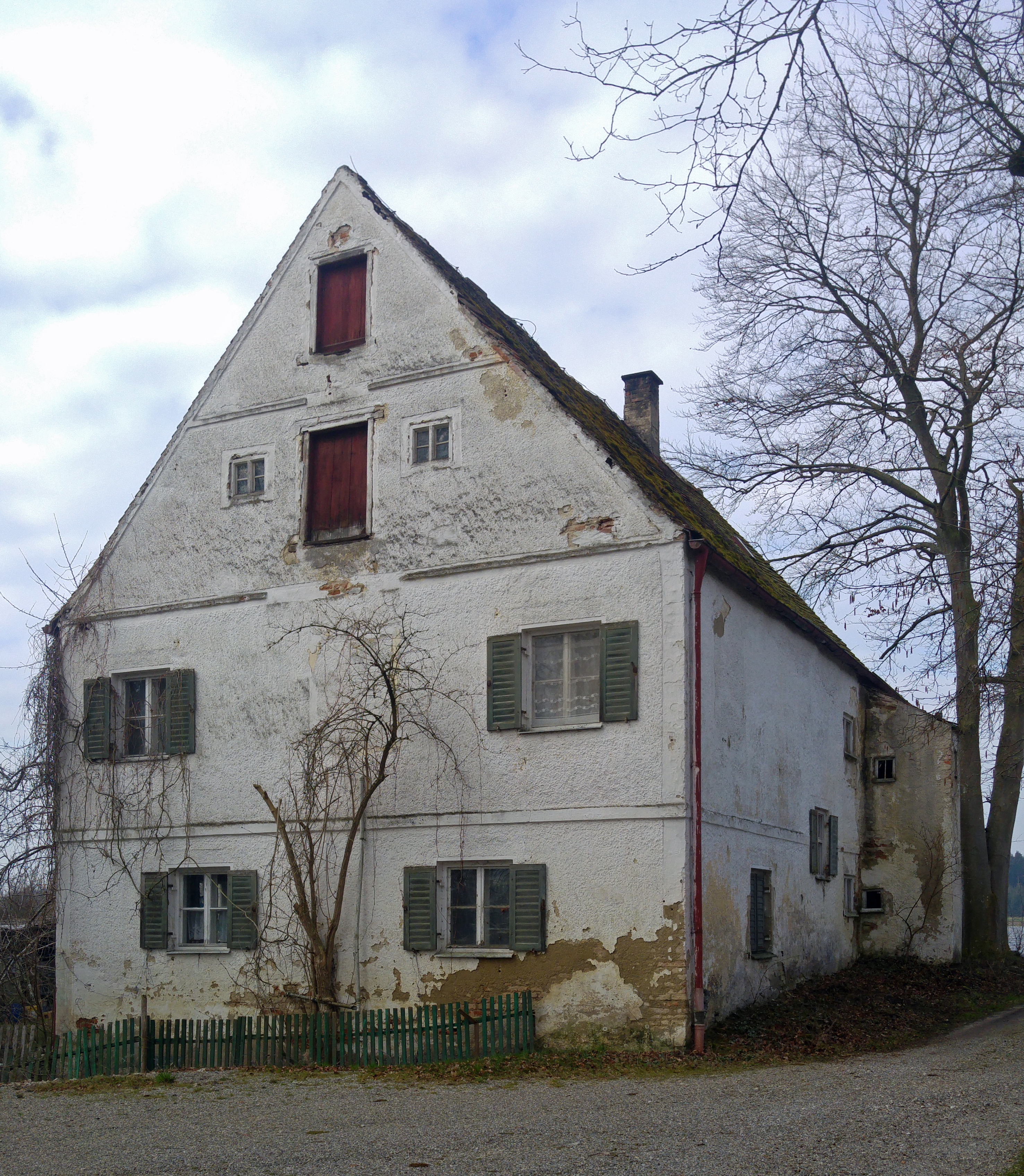 Baudenkmal Nr. D-7-71-144-10